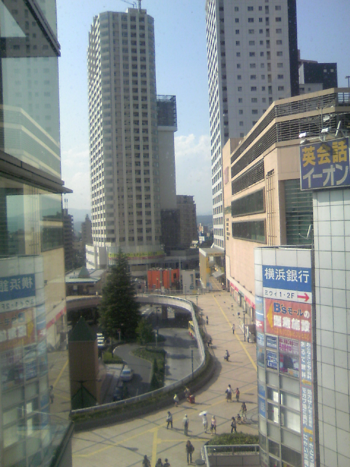 meweから見た橋本駅前